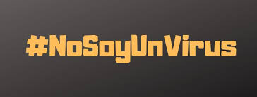 Mensaje de #Nosoyunvirus ante el brote de sentimiento antichino por el coronavirus